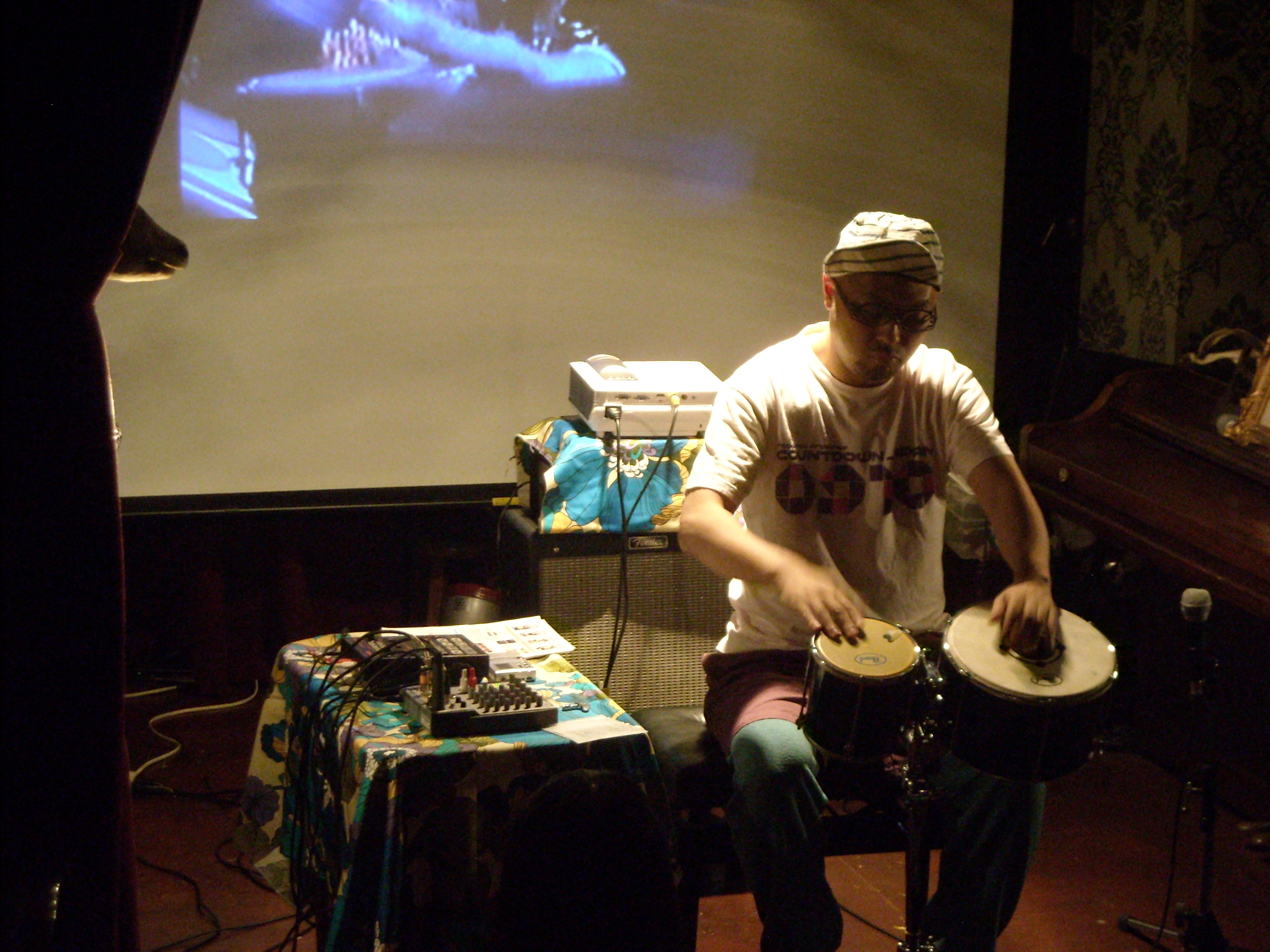 ASA-CHANG (Tabula Player)